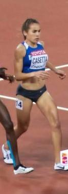 d7_24 3000mst dames finale